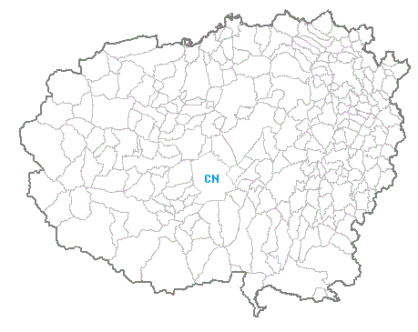 Confini dei comuni della provincia di Cuneo